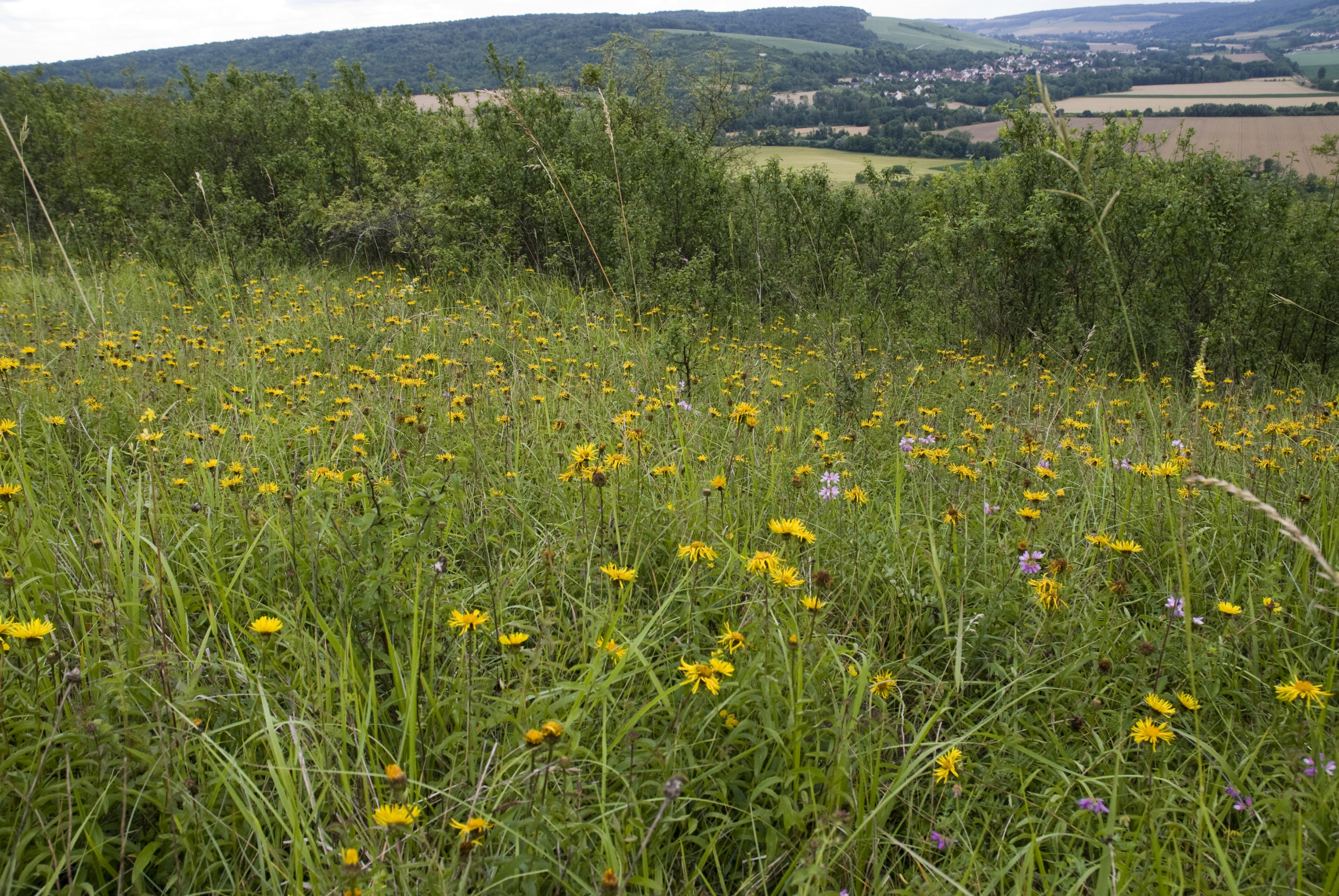 Inula salicina Coteau de Chartèves (Aisne), France